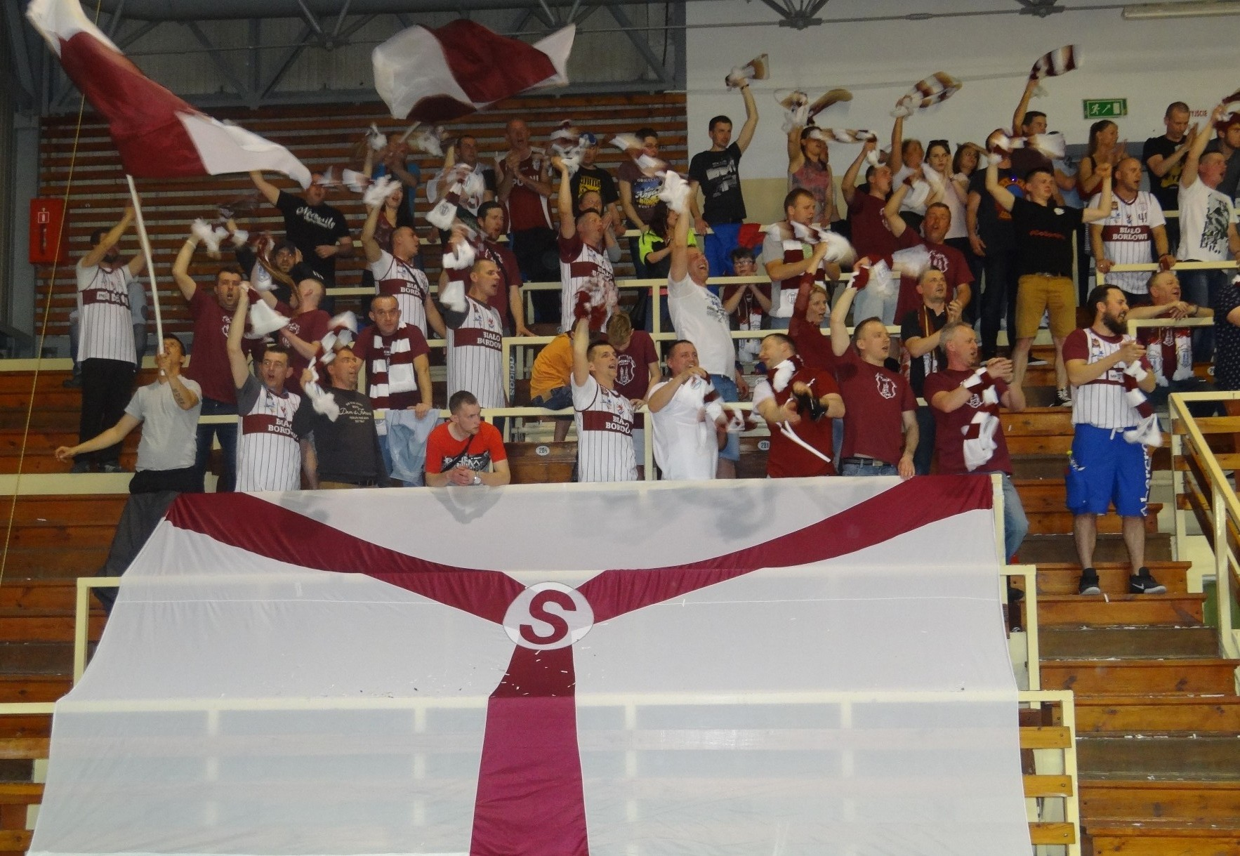 Kibice Spójni Stargard podczas meczu z GKS Tychy (28.04.2018)